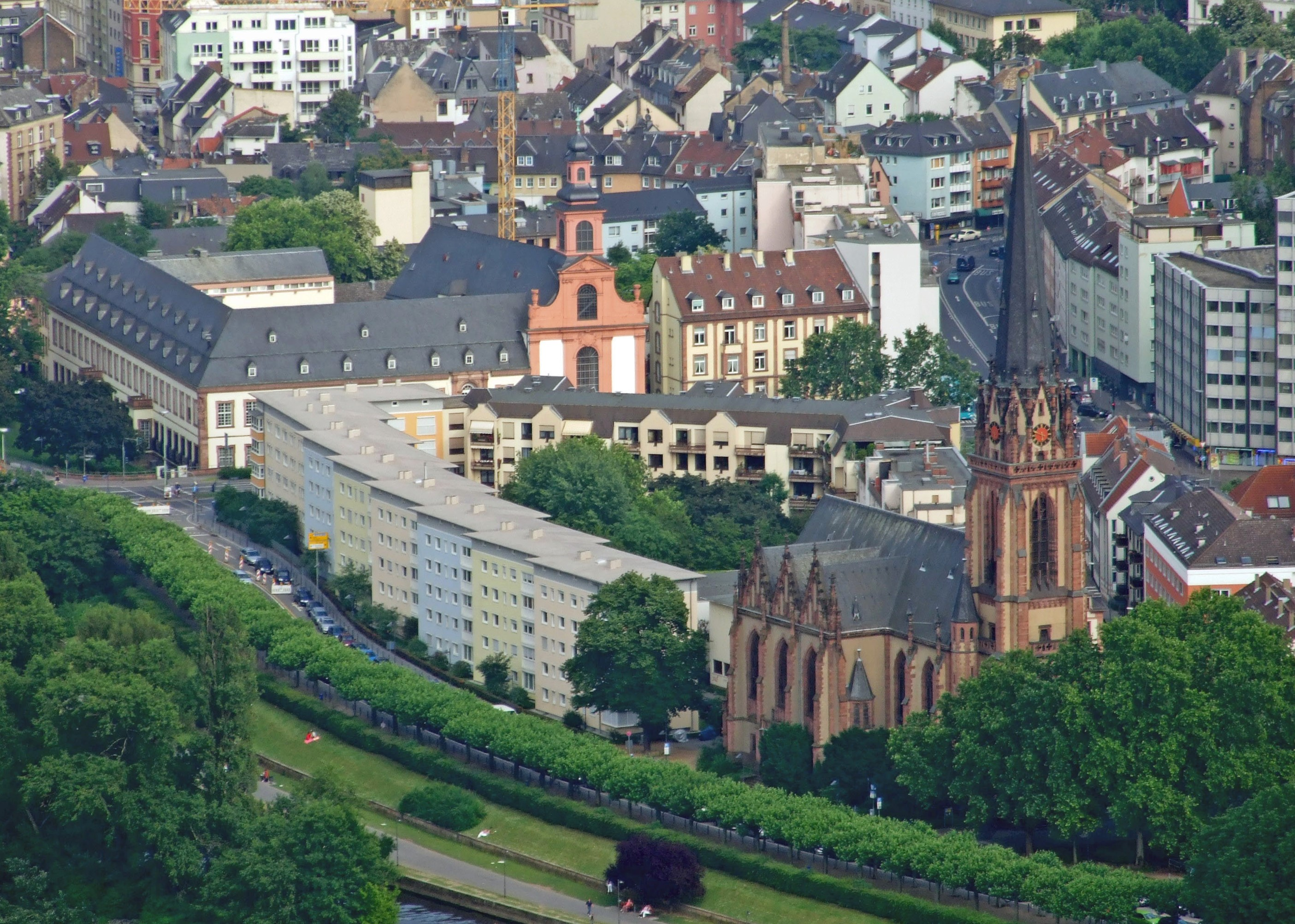 Anfang des Museumsufer mit dem Ikonenmuseum im Deutschordenshaus, neben der Deutschordenskirche. Im Vordergrund die Dreikönigskirche in Ffm-Sachsenhausen